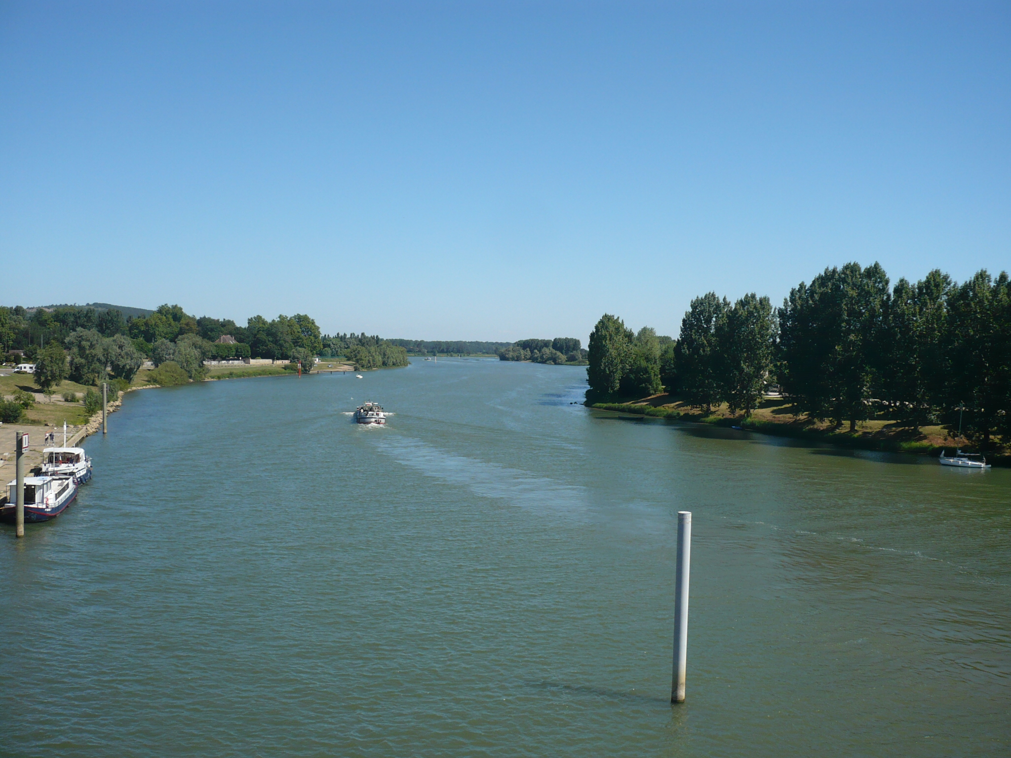 Saône/Tournus